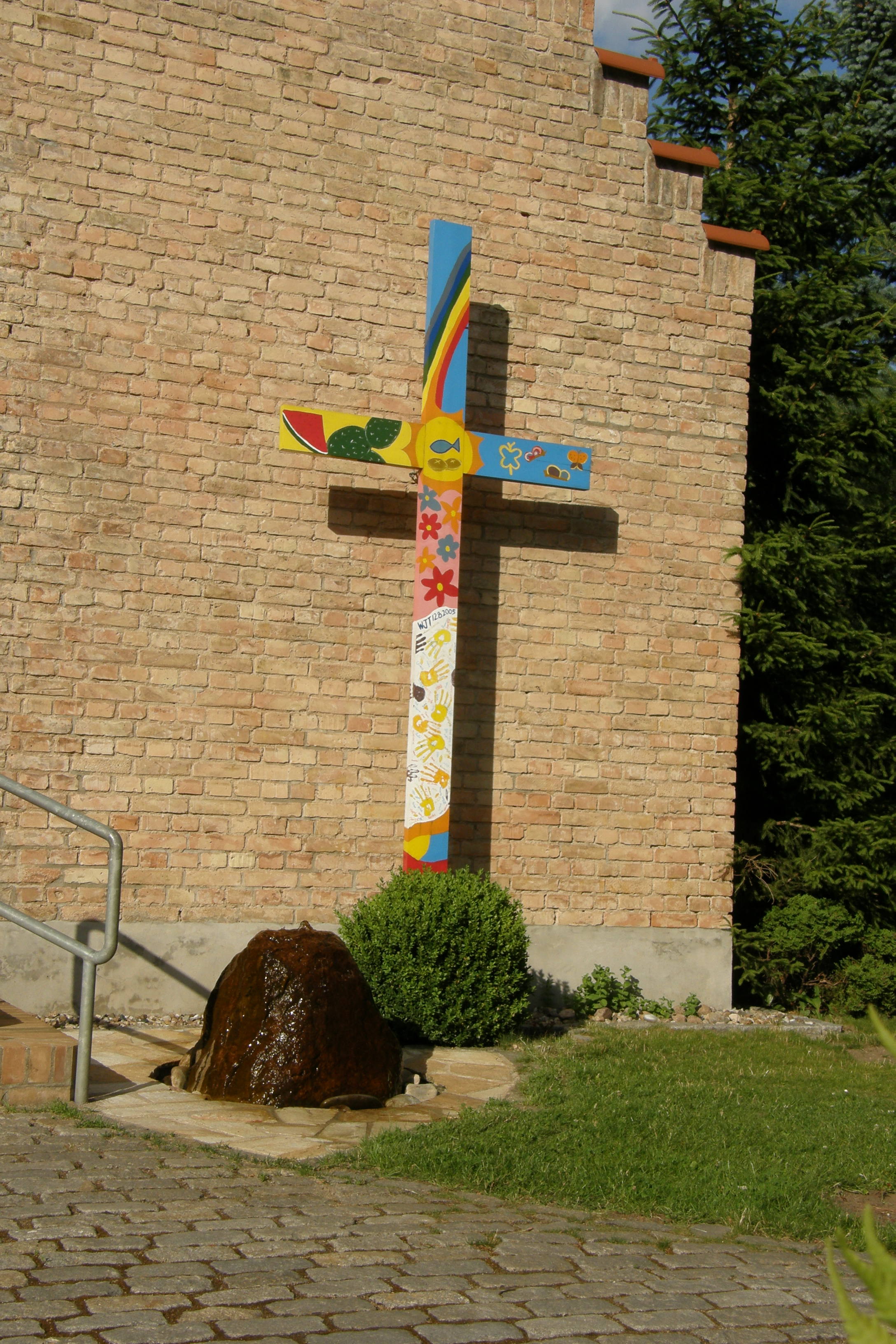 Außenansicht: farbig gestaltetes Holzkreuz